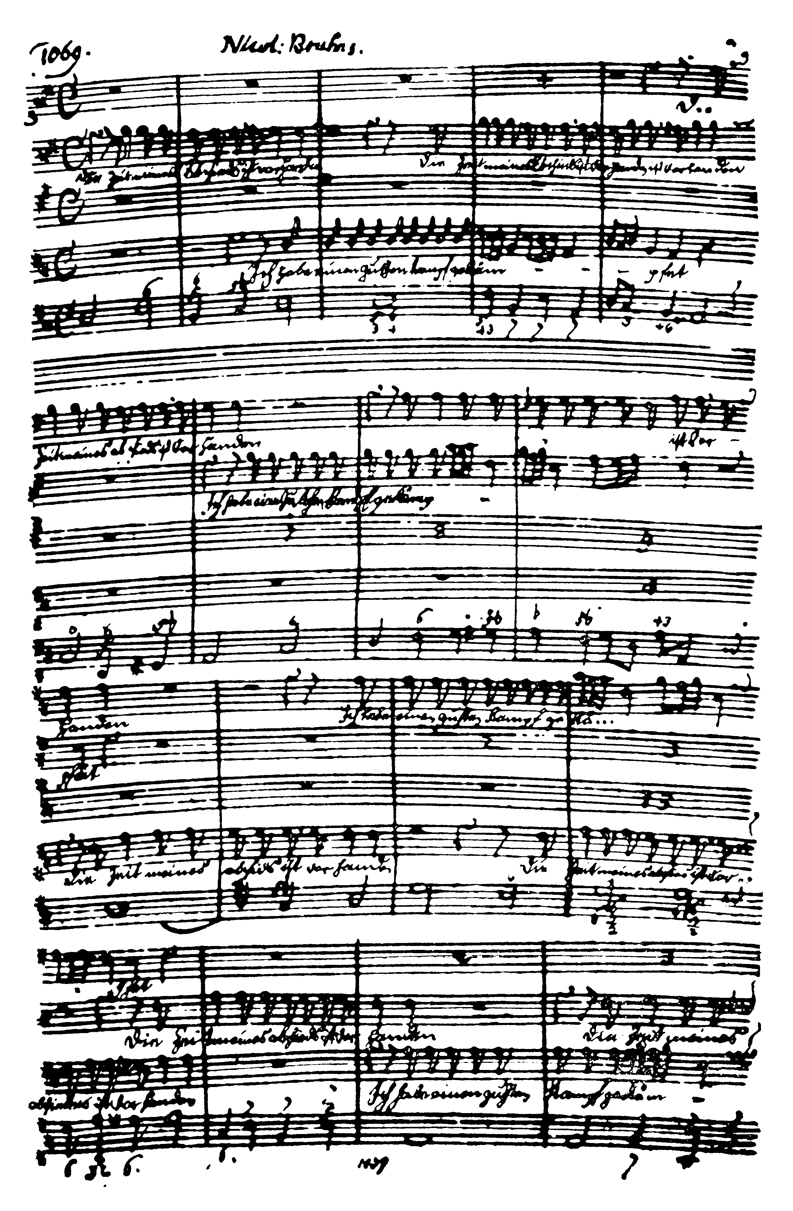 Anfang der Kantate Die Zeit meines Abschieds ist vorhanden von Nicolaus Bruhns. Abschrift aus der von Georg Österreich angelegten Musikaliensammlung.